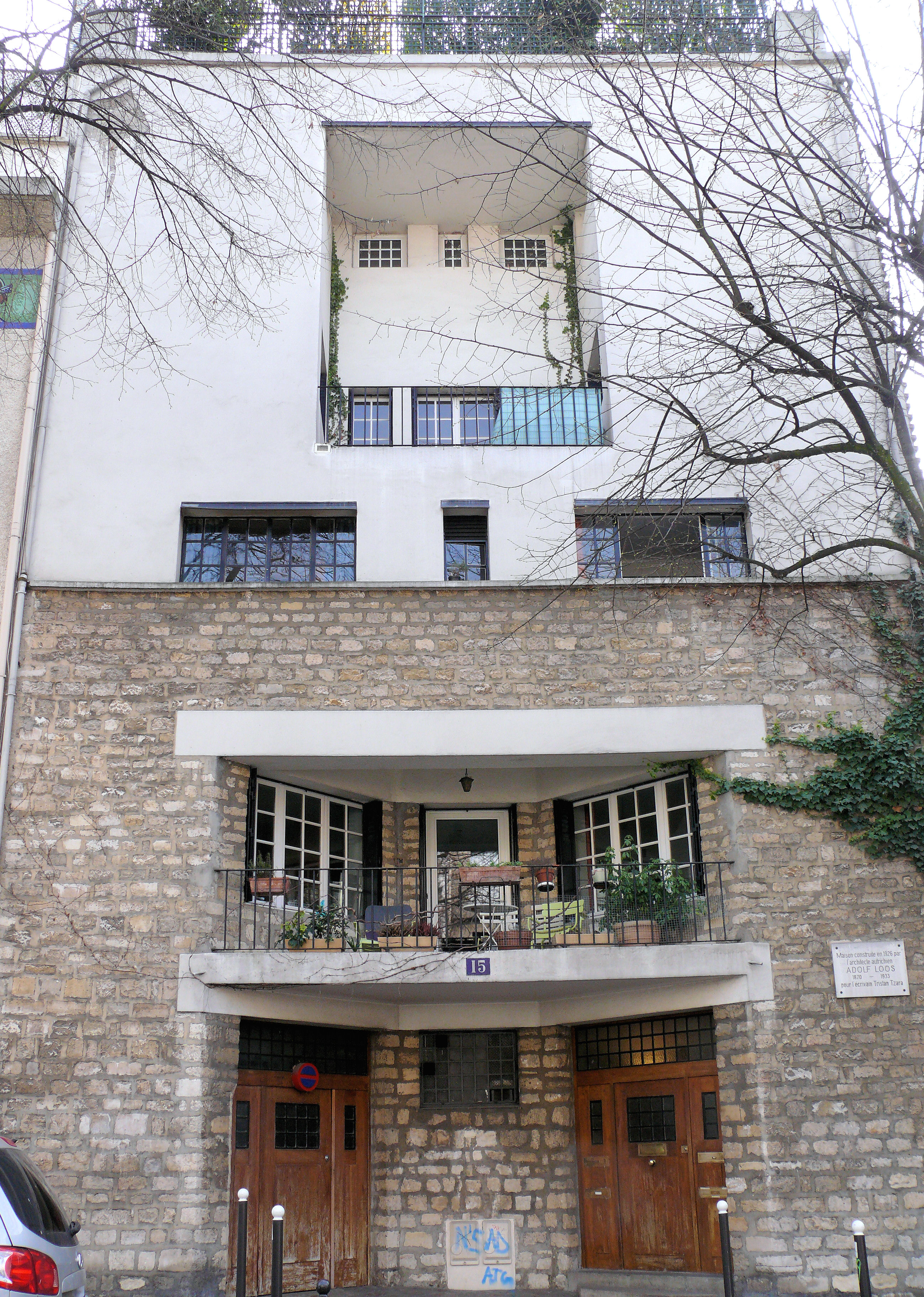 Paris 18e arrondissement - Maison Tristan Tzara - Façade sur l'avenue Junot